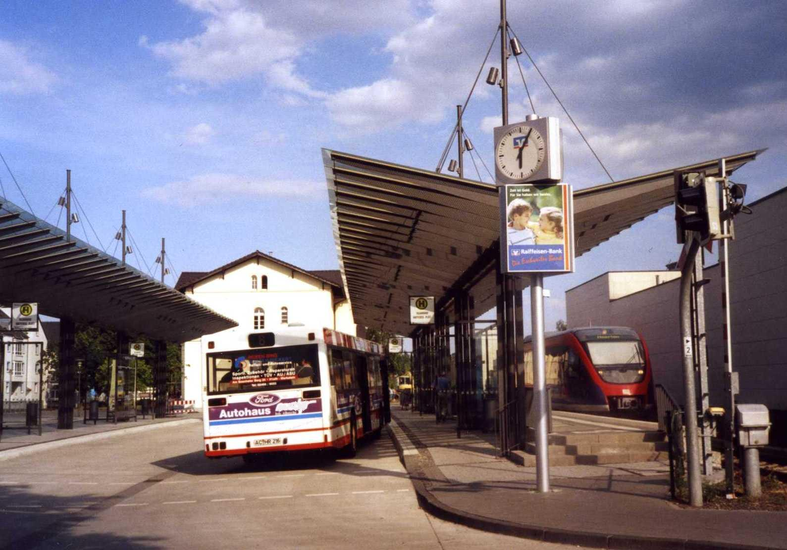 Kombibahnsteig mit Rollstuhlrampe am Talbahnhof in Eschweiler mit Bus und Euregiobahn